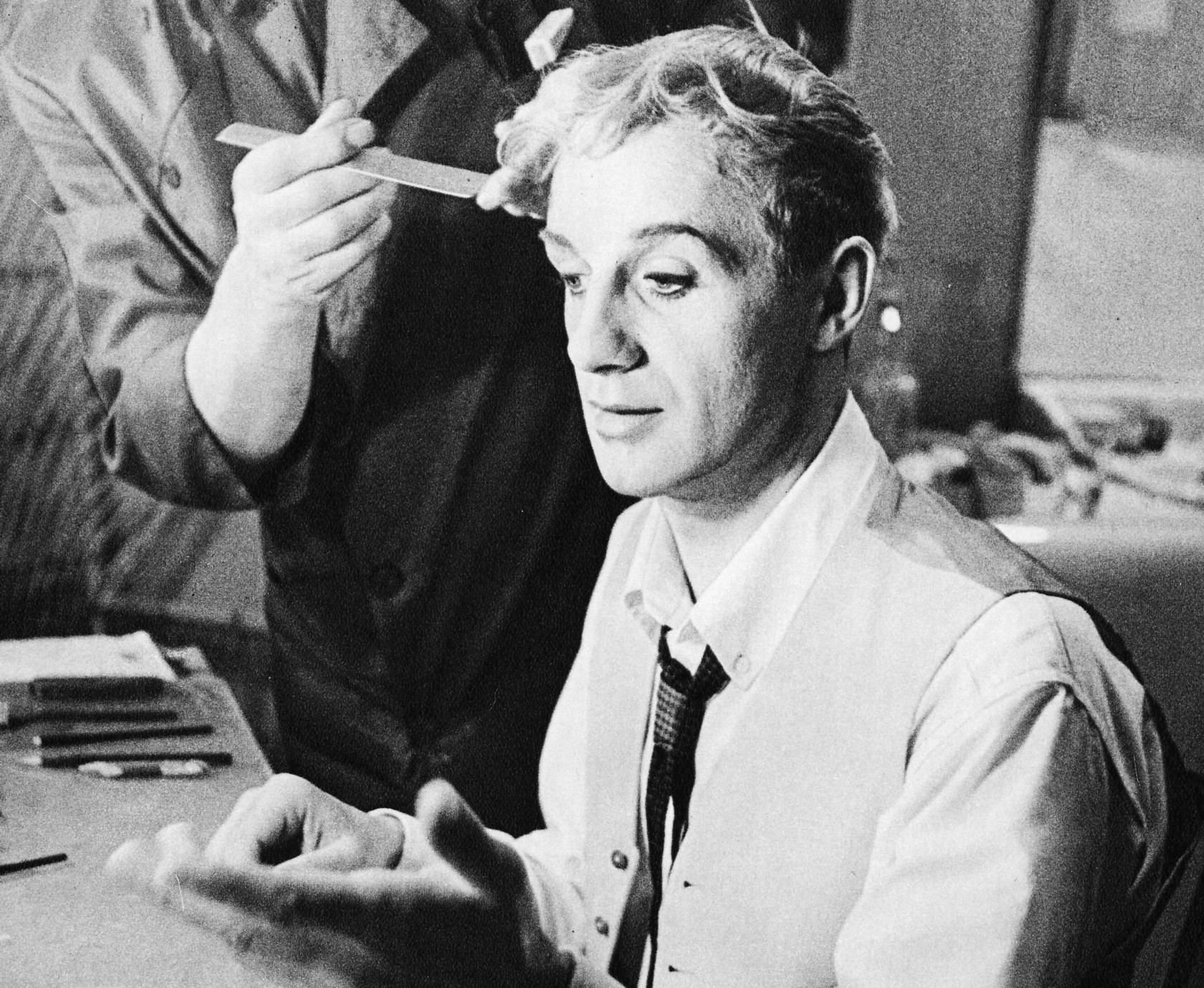 Skådespelaren Jarl Kulle